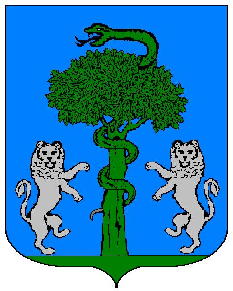 Grb obitelji Milesi